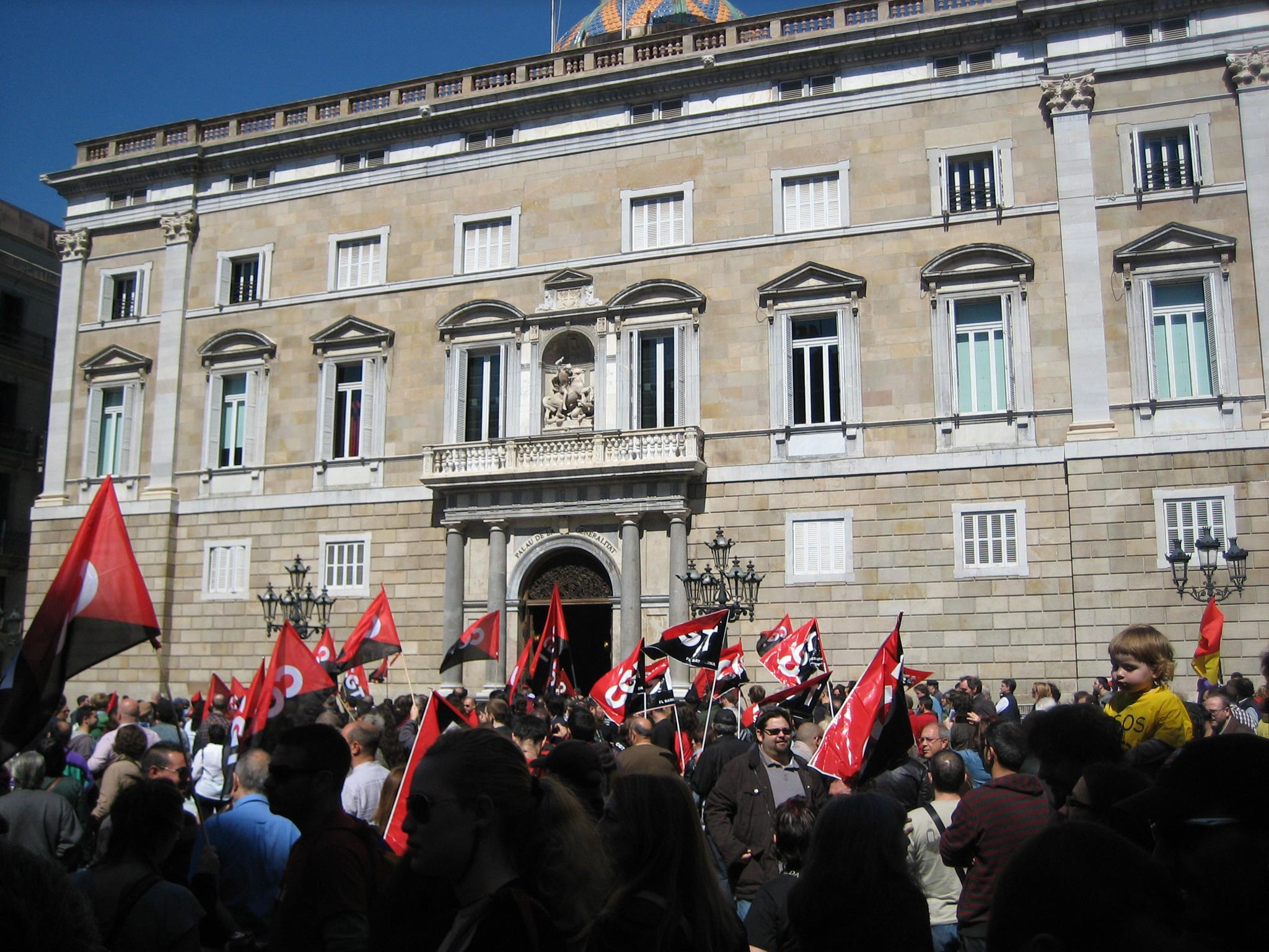 Manifestació